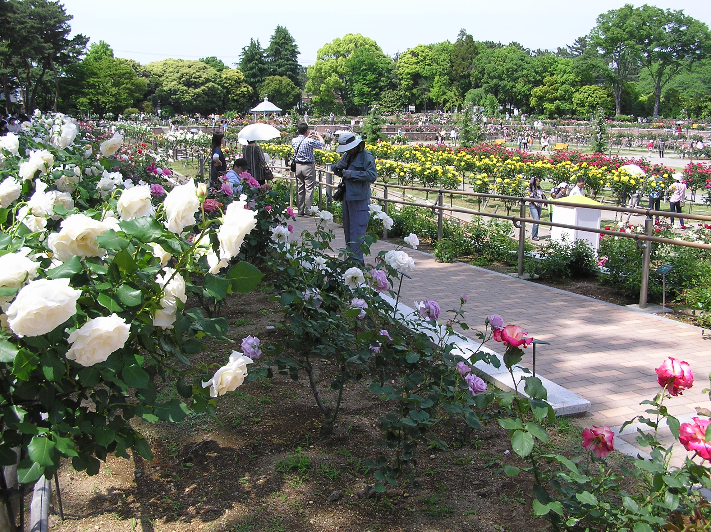 バラ園